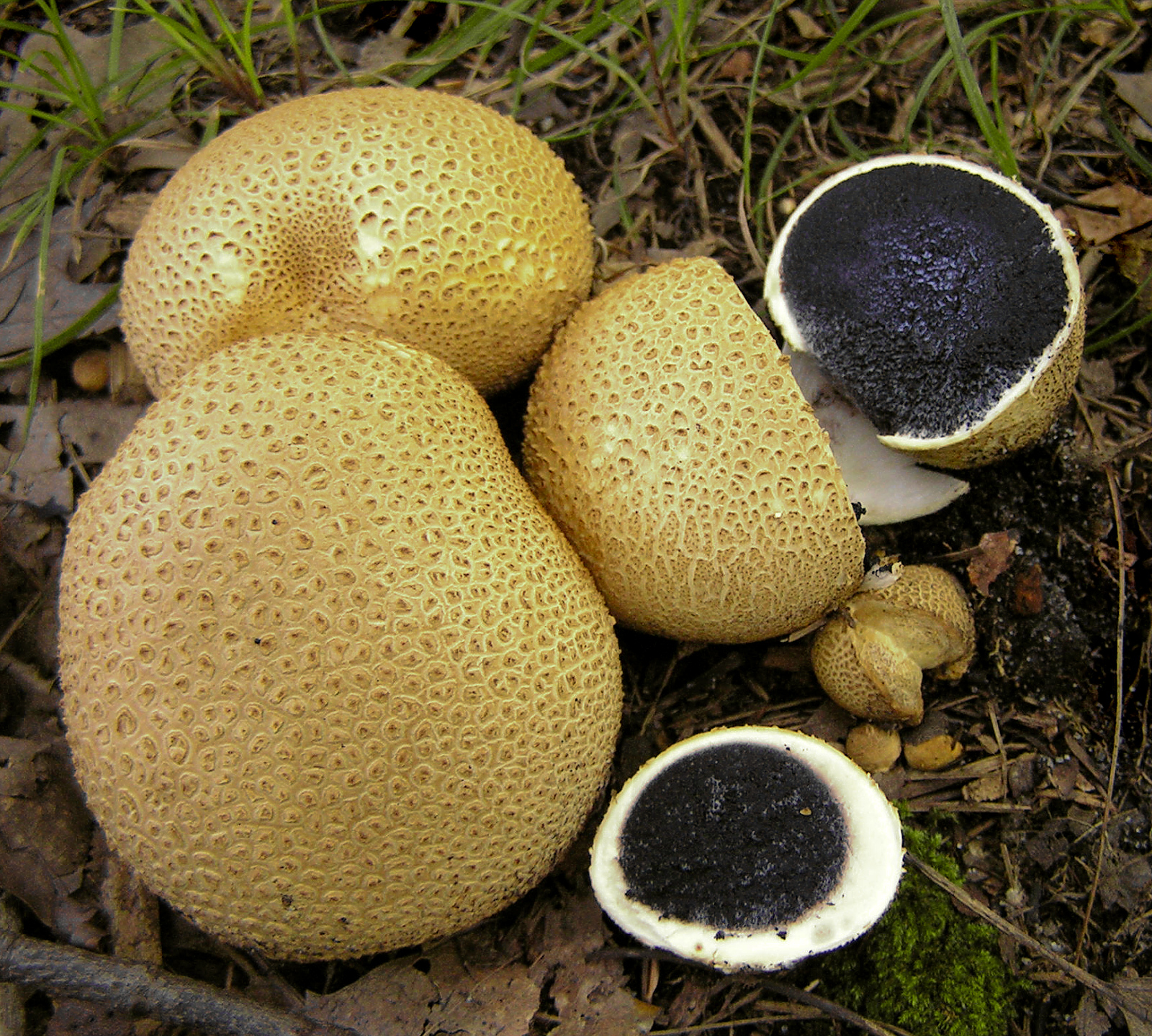 Scleroderma citrinum Pers.